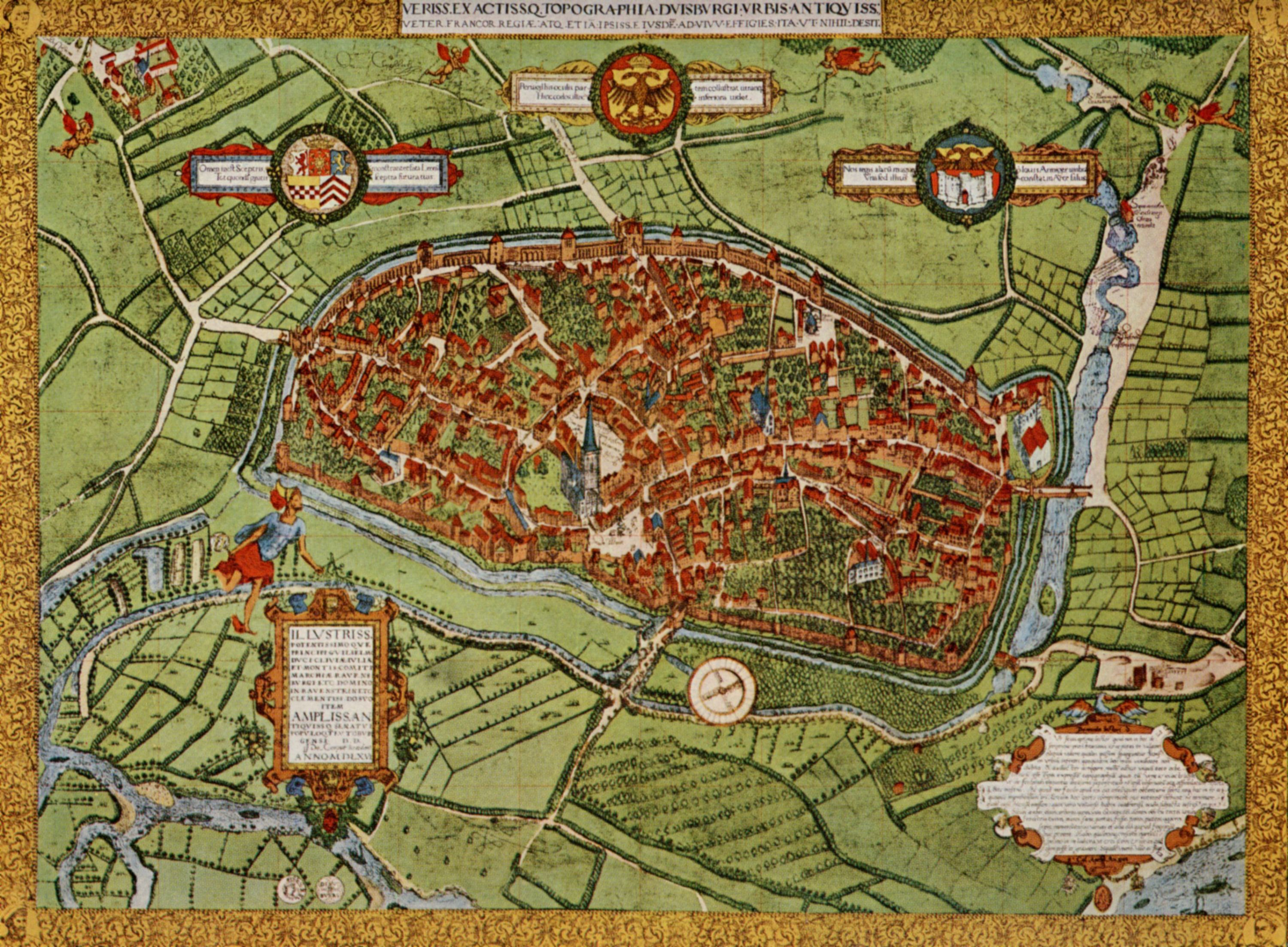 Historische Postkarte von Duisburg Kupferstich, koloriert, von dem Künstler Johann van den Corput: Duisburg, Vogelschauplan von Nordwesten, von 1566